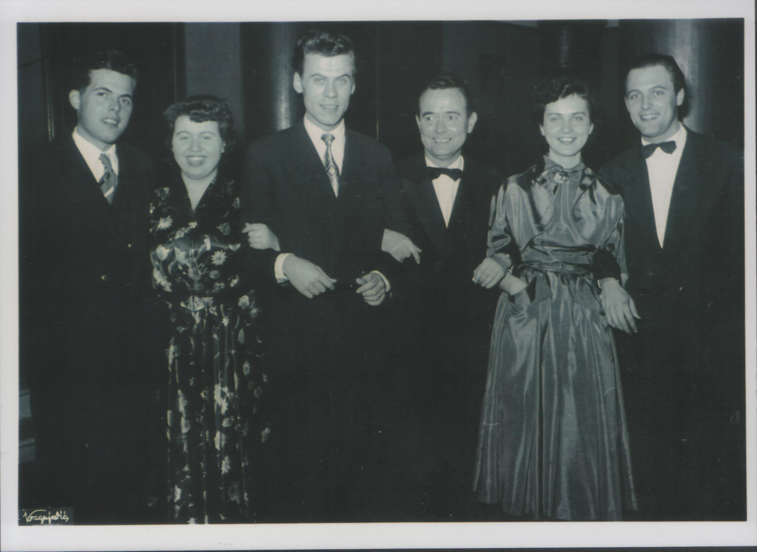 Stevan Kragujevic: reditelj slovenackog filma Vesna, Frantisek Cap, i nosioci glavnih rola na premijeri u Beogradu, 1953